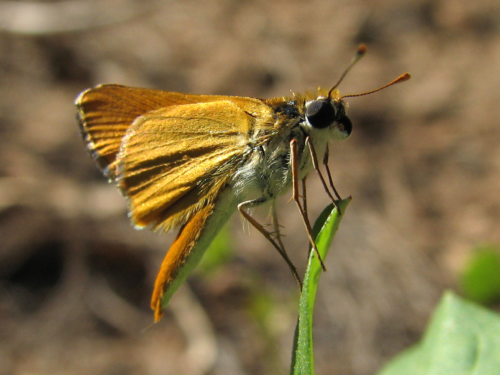 Copaeodes aurantiaca. Arroyo Chico, Tucson, Pima County, Arizona, USA. 16 August 2008